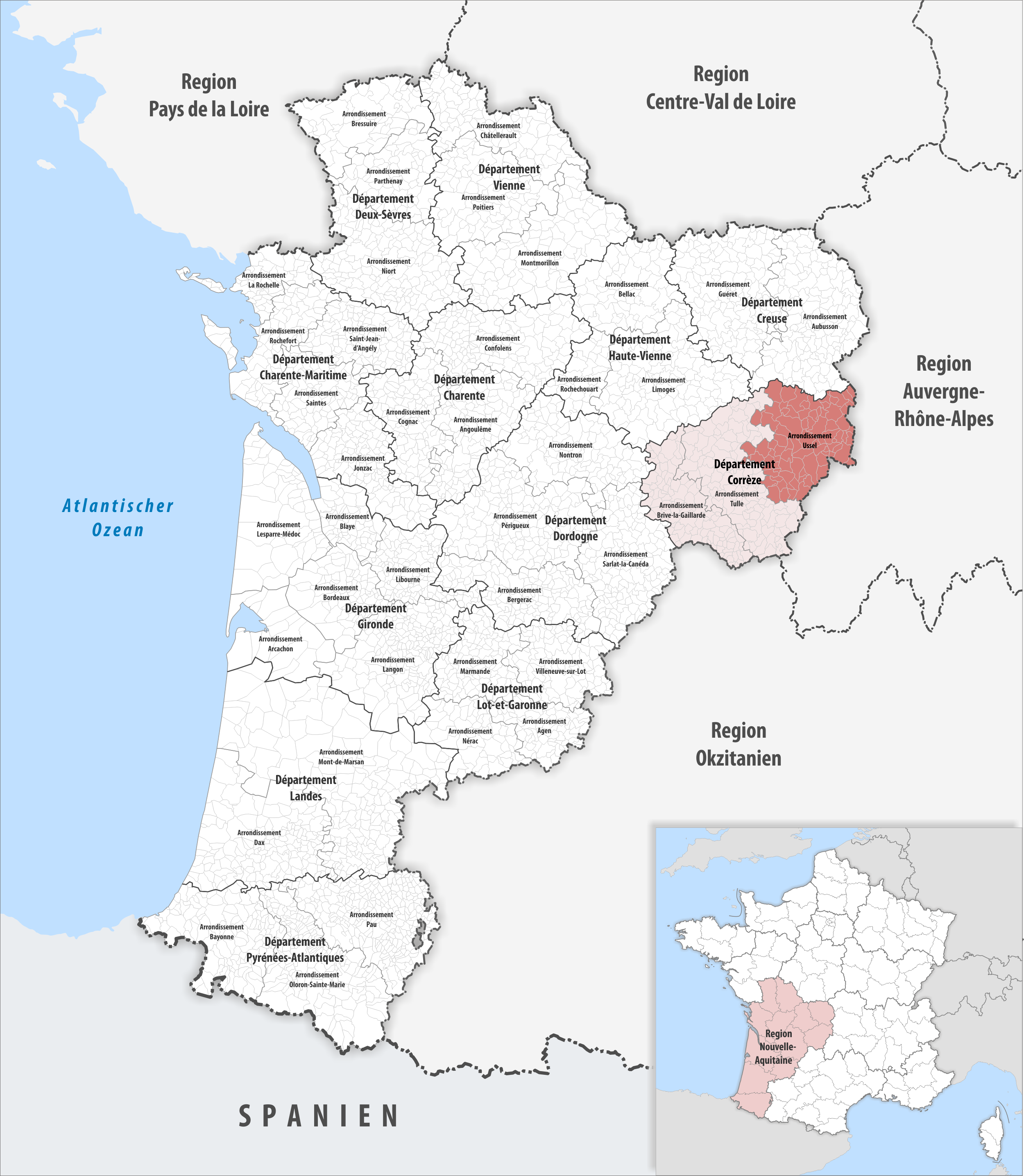 Lage des Arrondissements Ussel